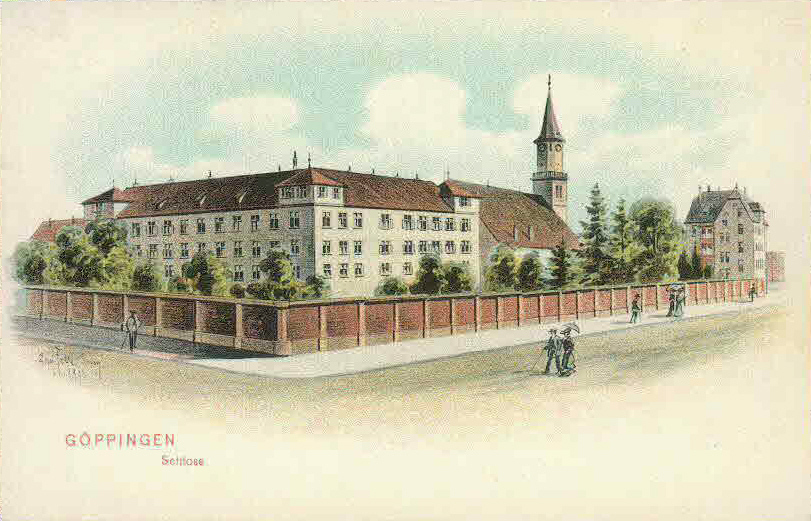 Göppingen, Schloss. Ansichtskarte von Eugen Felle.